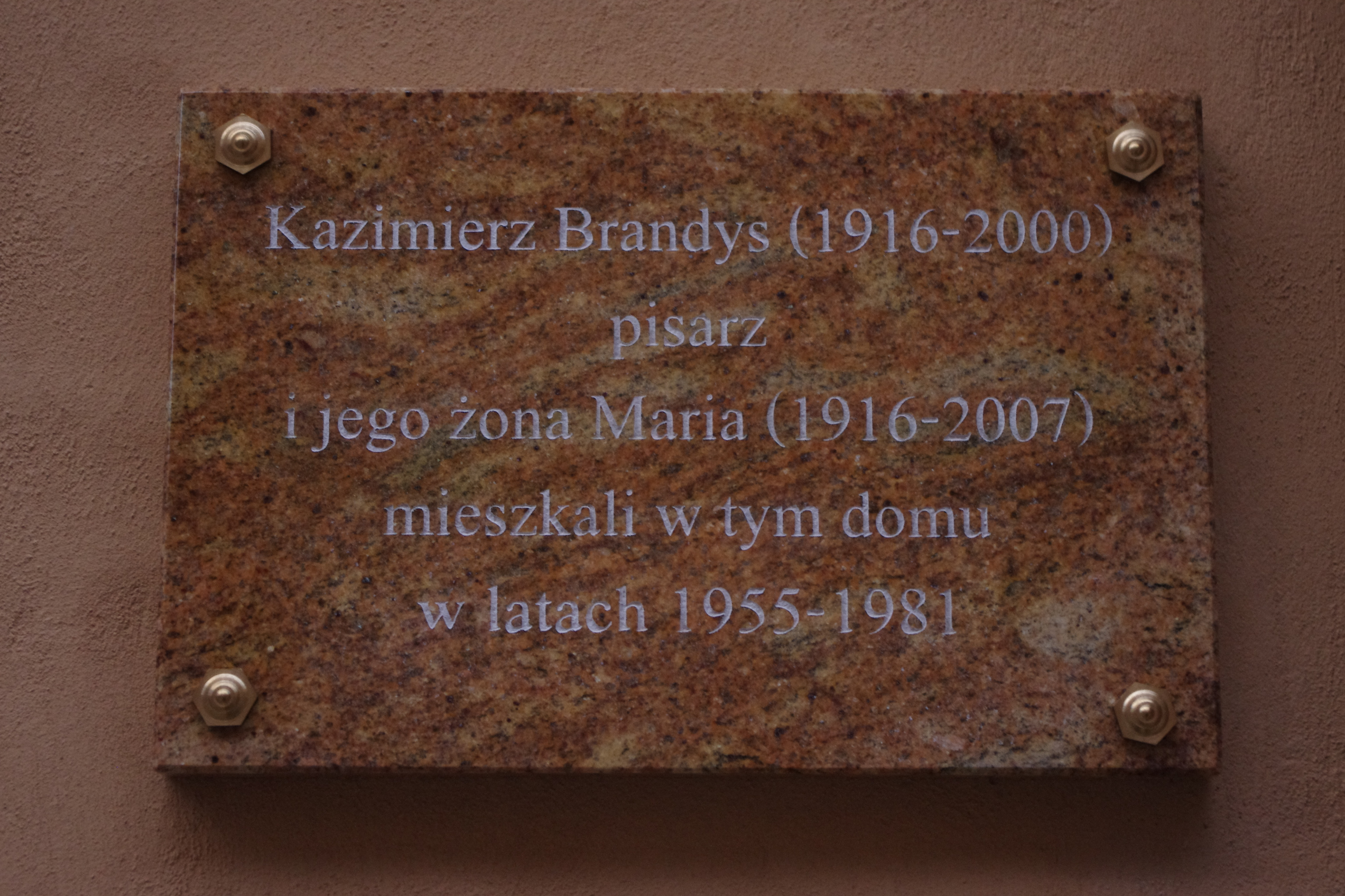 Tablica upamiętniająca Kazimierza i Marię Brandysów na ul. Nowomiejskiej 5 w Warszawie, odsłonięta 0 listopada 2012 r.